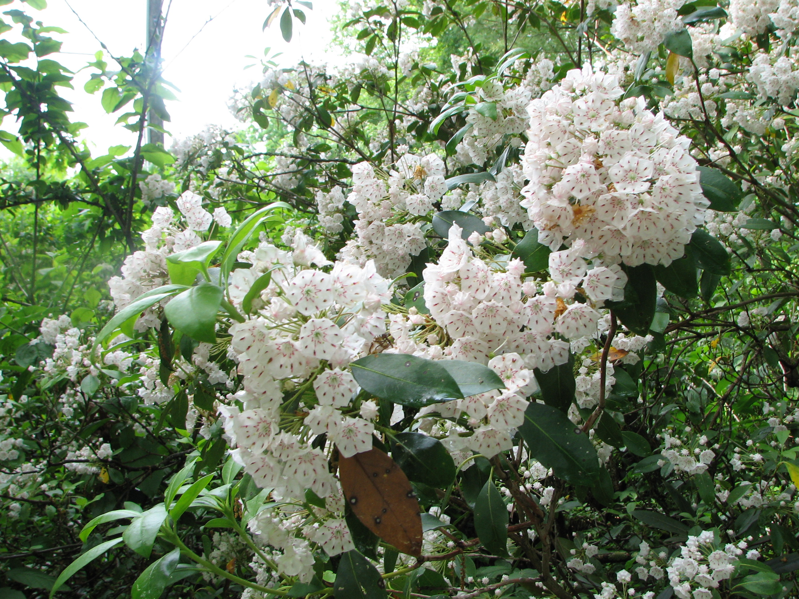 Wild Kalmia latifolia